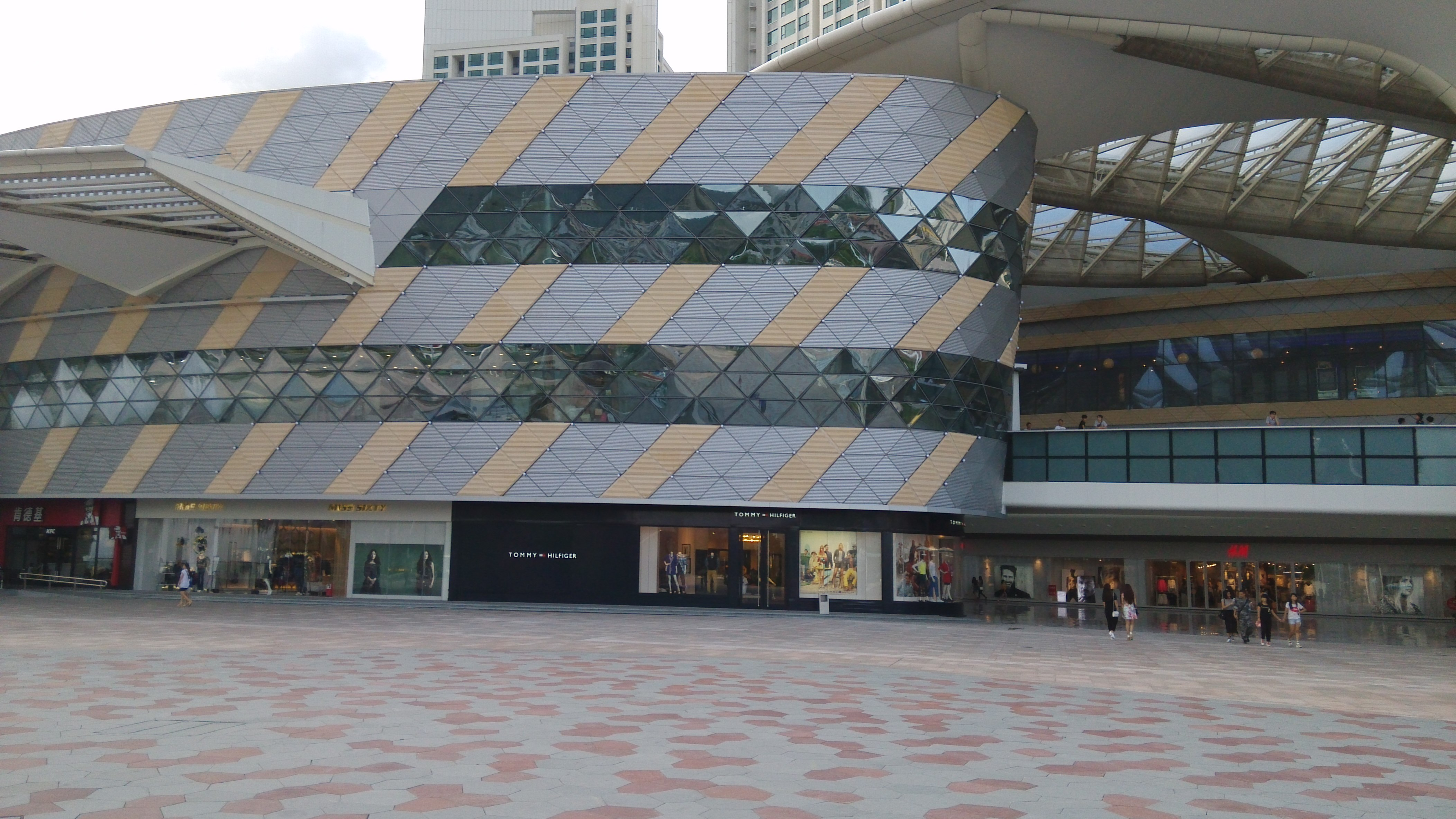 我自己的作品